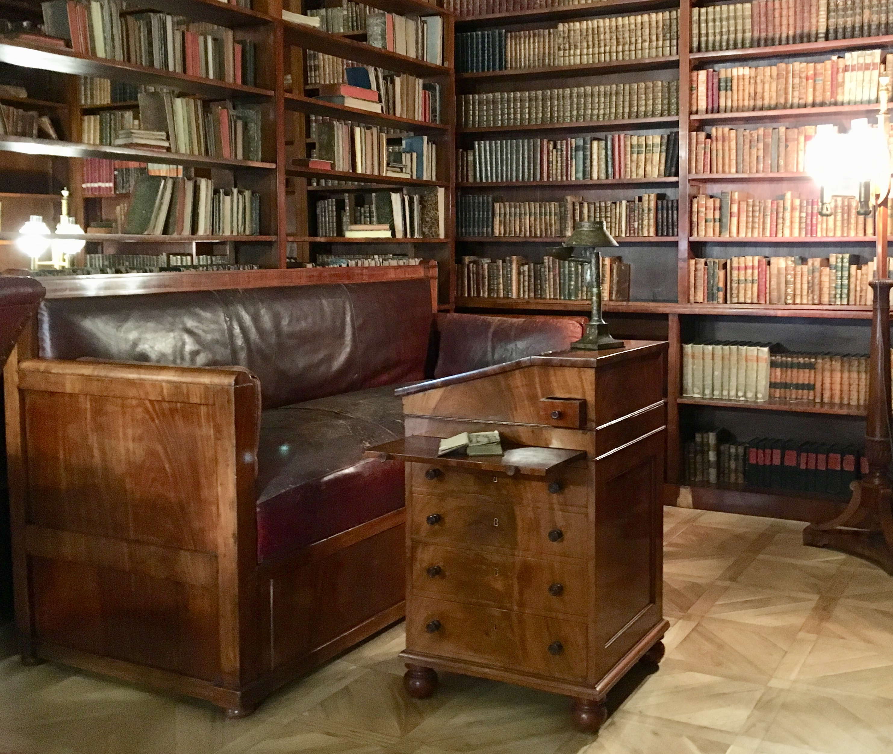 Фрагмент экспозиции музея-квартиры А. С. Пушкина на Мойке, 12